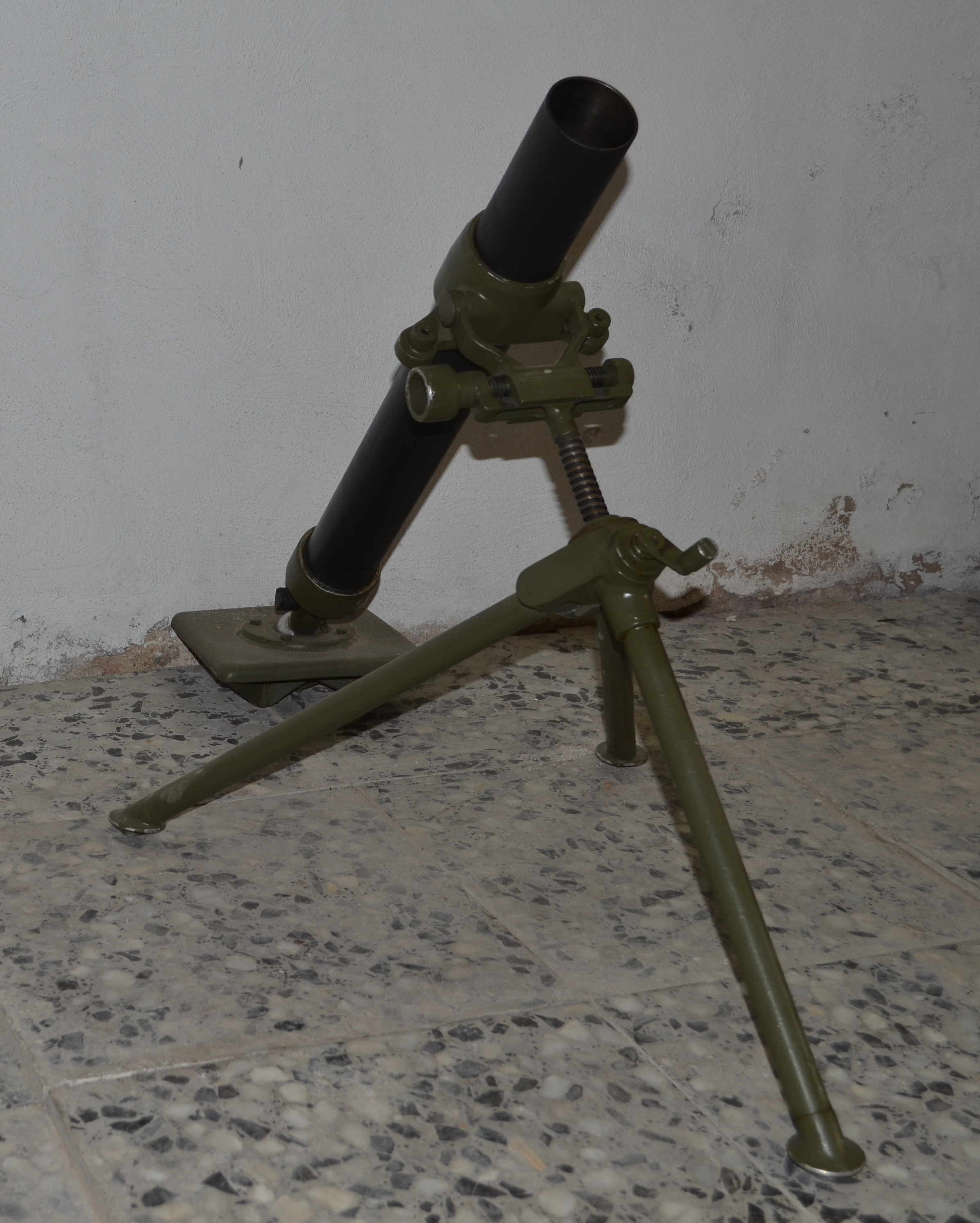 Mortero ECIA 60mm. modelo L